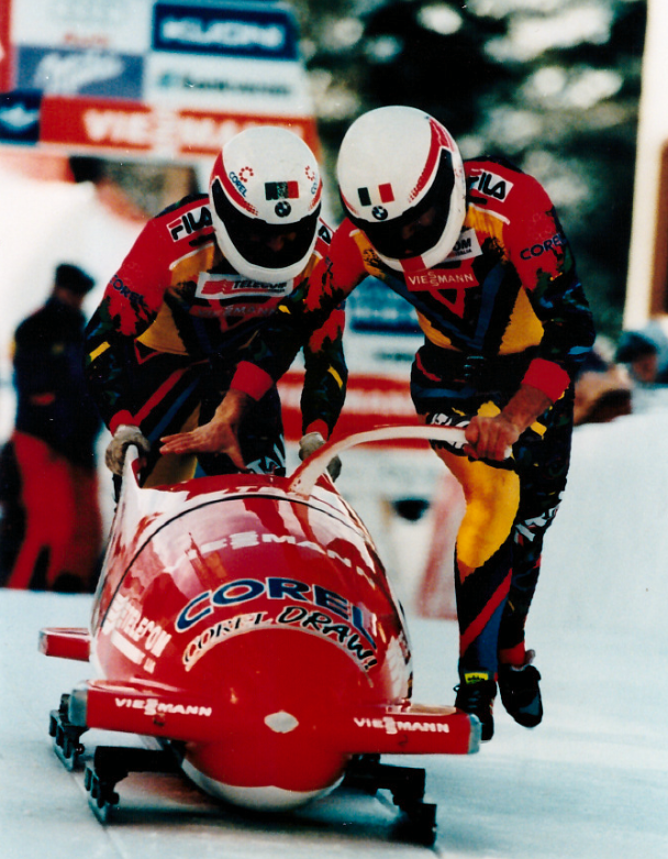 Huber Arnold bei der Fahrt im Eiskanal